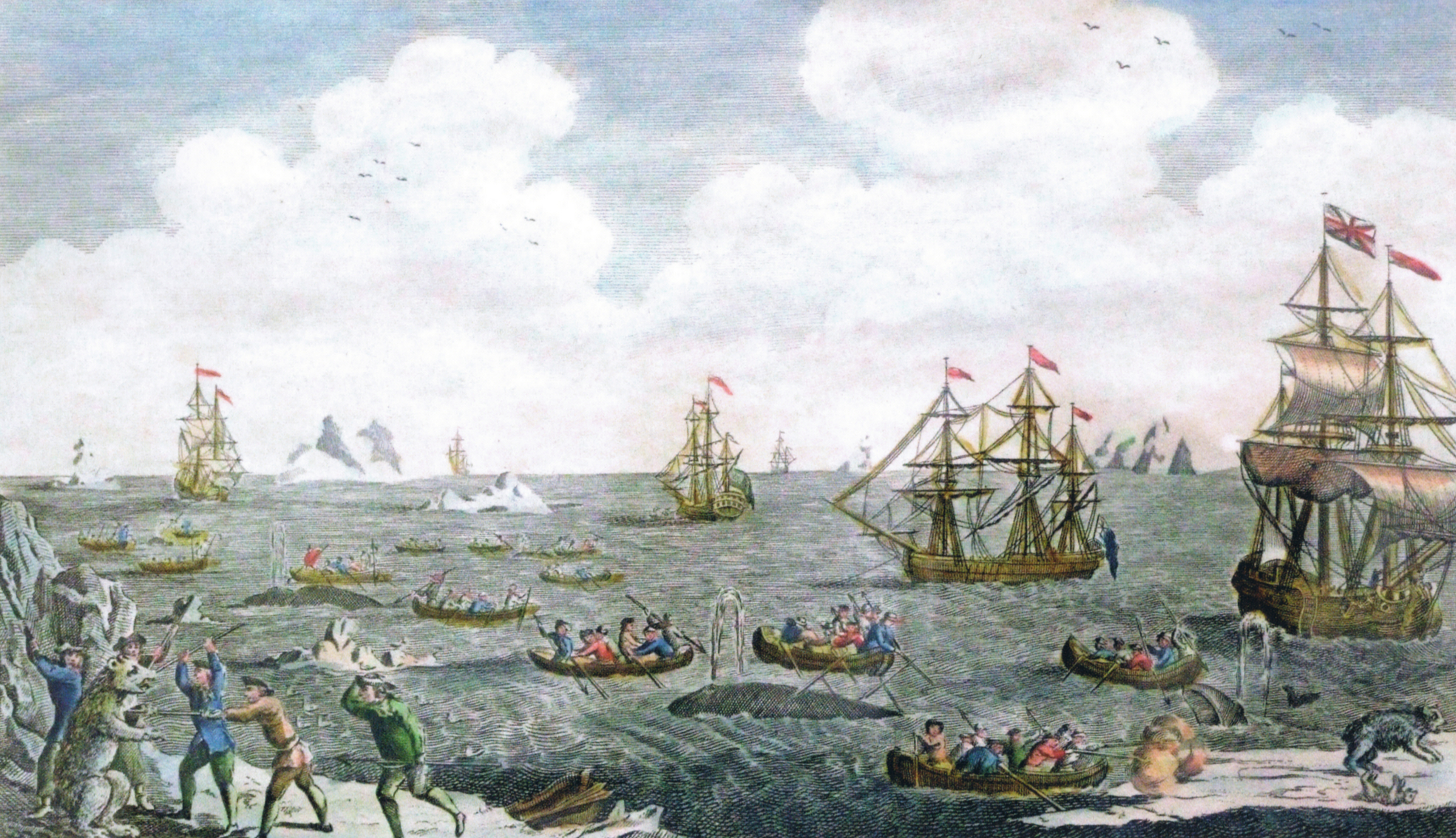 Wal- und Eisbärenjagd vor Grönland, Holzstich um 1780